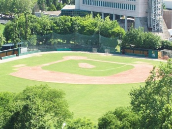 Il campo di gioco del Pilastro